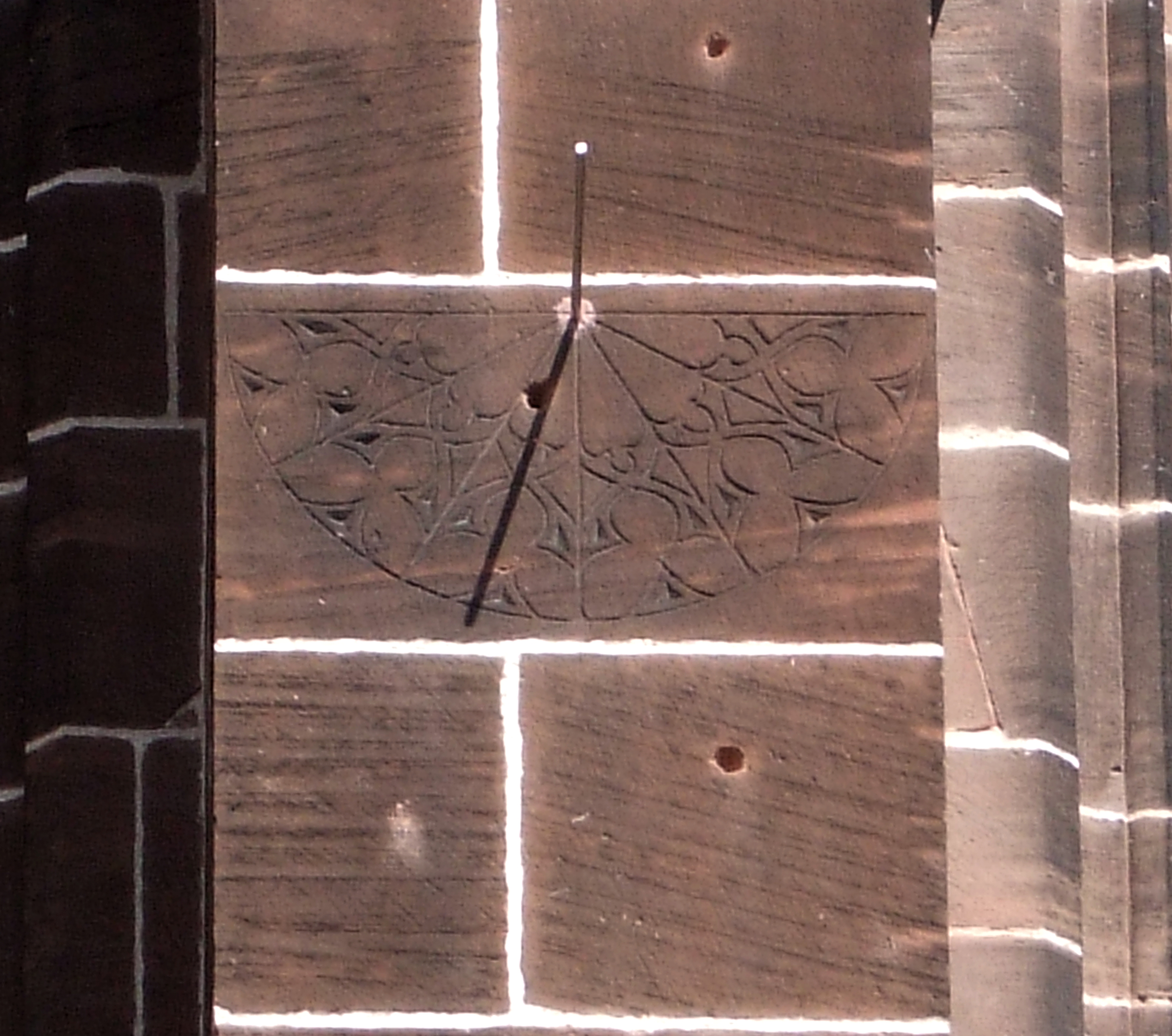 Gebetsuhr an St. Marien